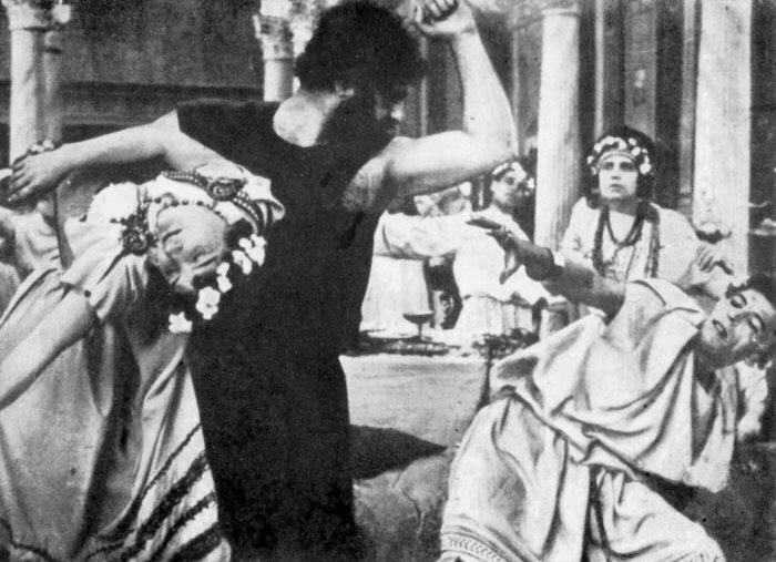 Immagine prodotta da uno screenshot (o da una foto di scena) della produzione Cines Marcantonio e Cleopatra, regia di Enrico Guazzoni (1913) pubblicata in AA.VV., Cines 1906-1956 Mezzo secolo di cinema italiano, a cura dell'ufficio stampa Cines, Roma 1956.